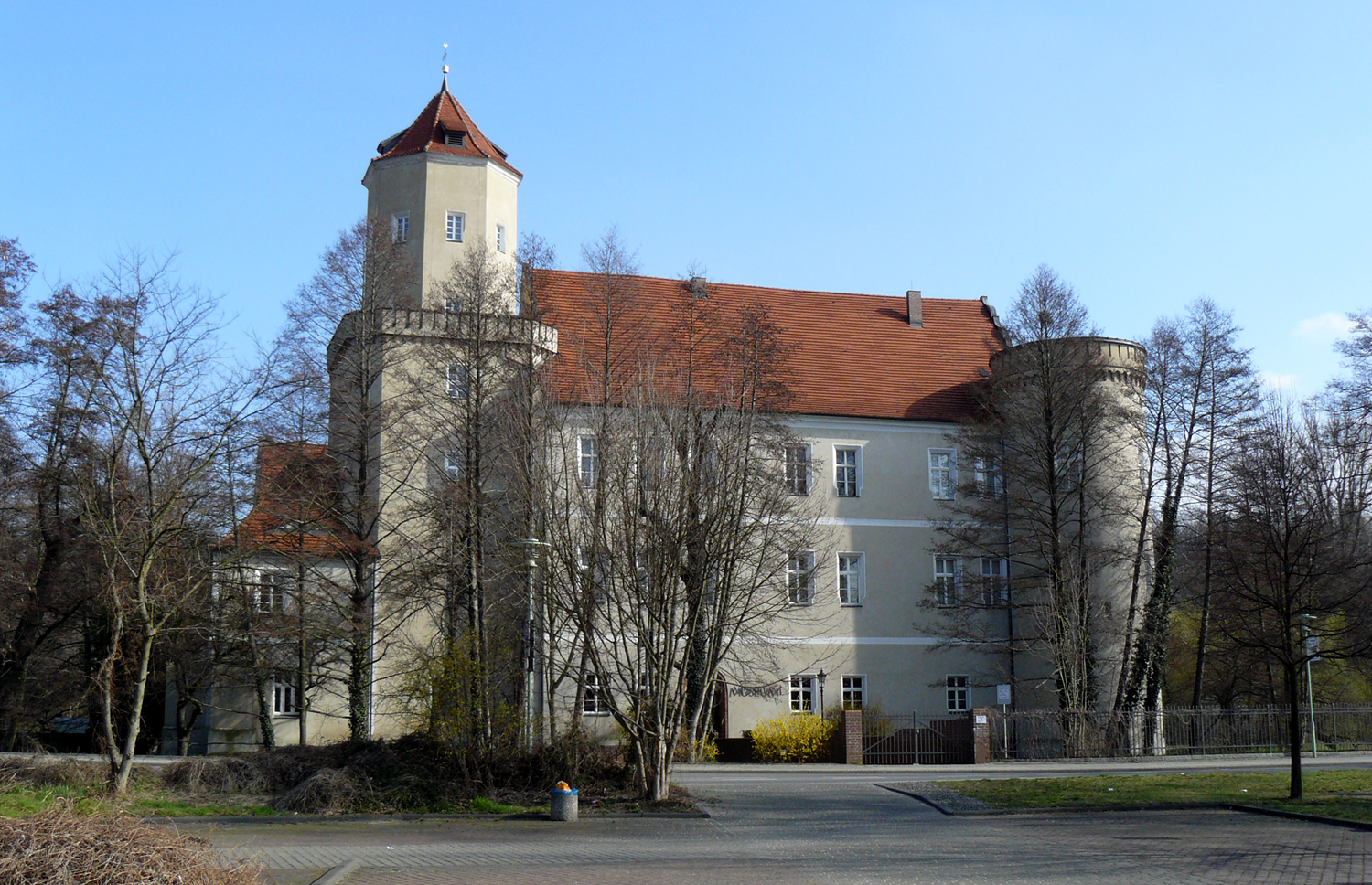 Schloss Spremberg Südseite